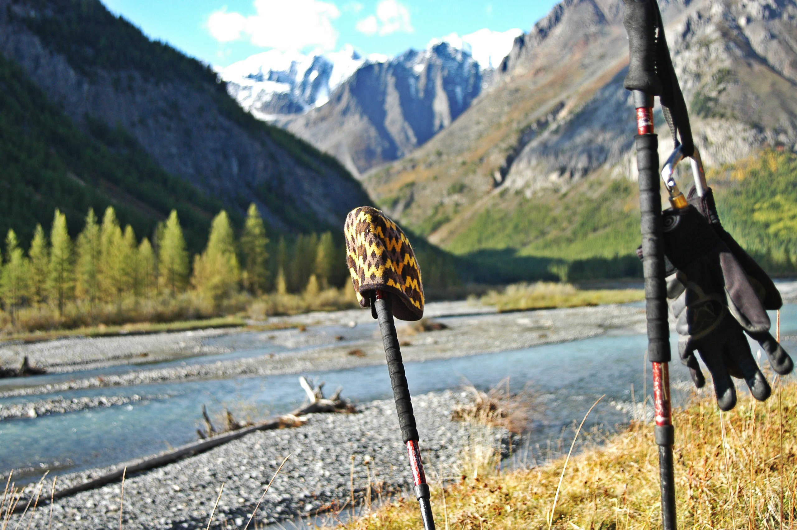 Туристическая стоянка в долине реки Карагем (Южно-Чуйский хребет, Алтай).